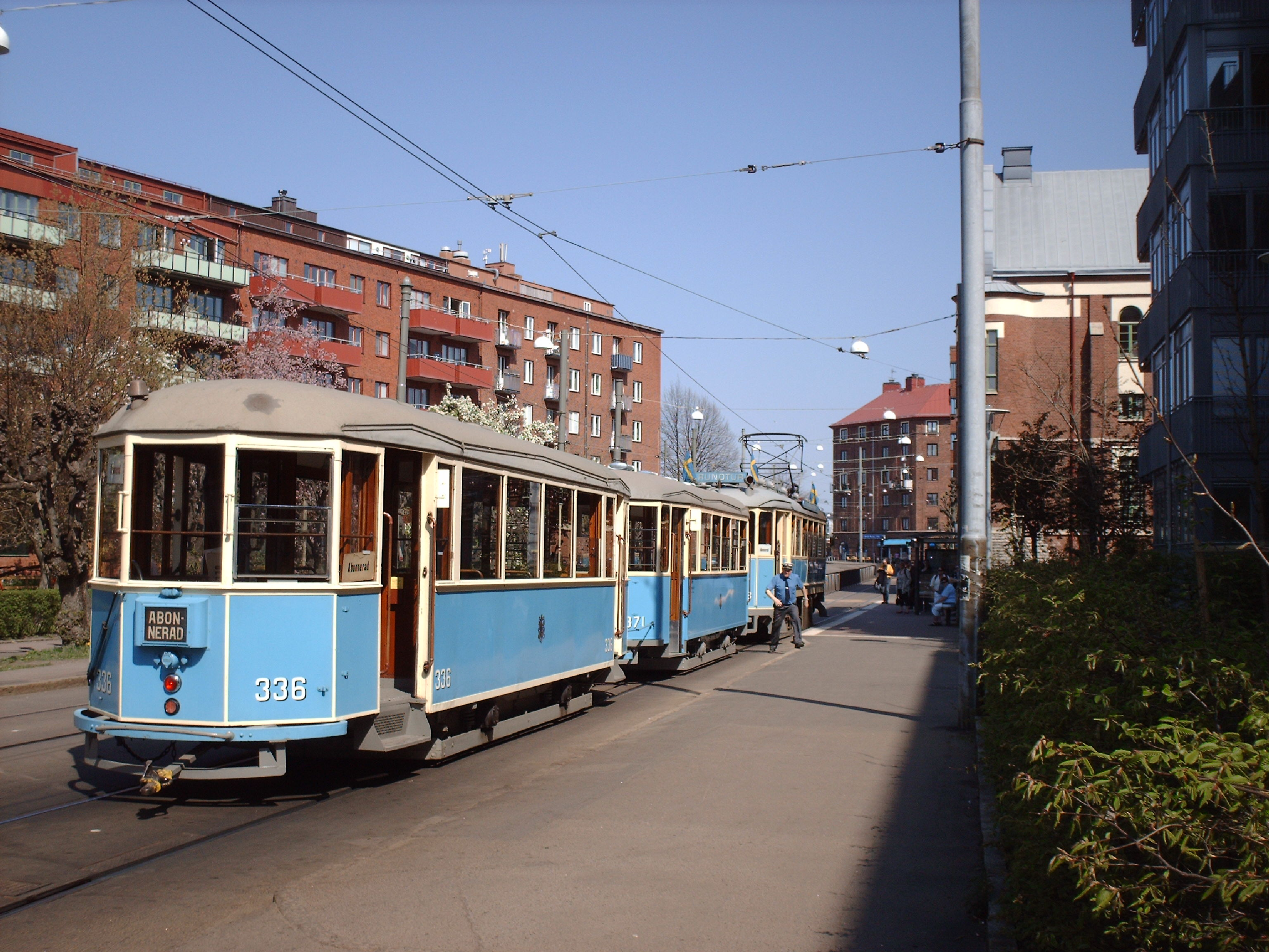 Lisebergslinjen vid vagnhallen stampgatan.